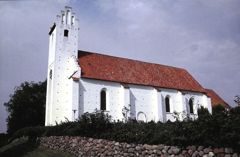 Dråby Kirke i Danmark. Dråby kirke